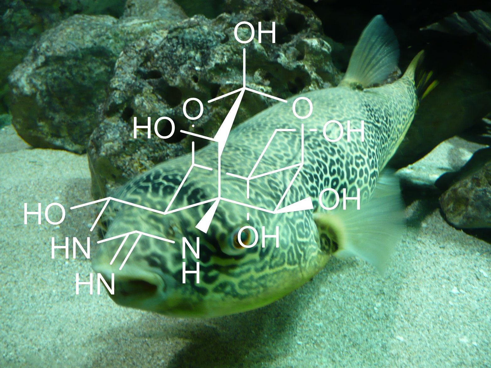 Tetrodotoxine